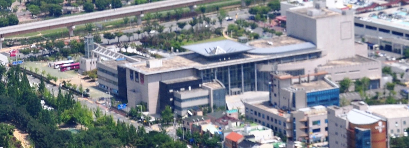 김해 문화의 전당 (김해, 내외동)